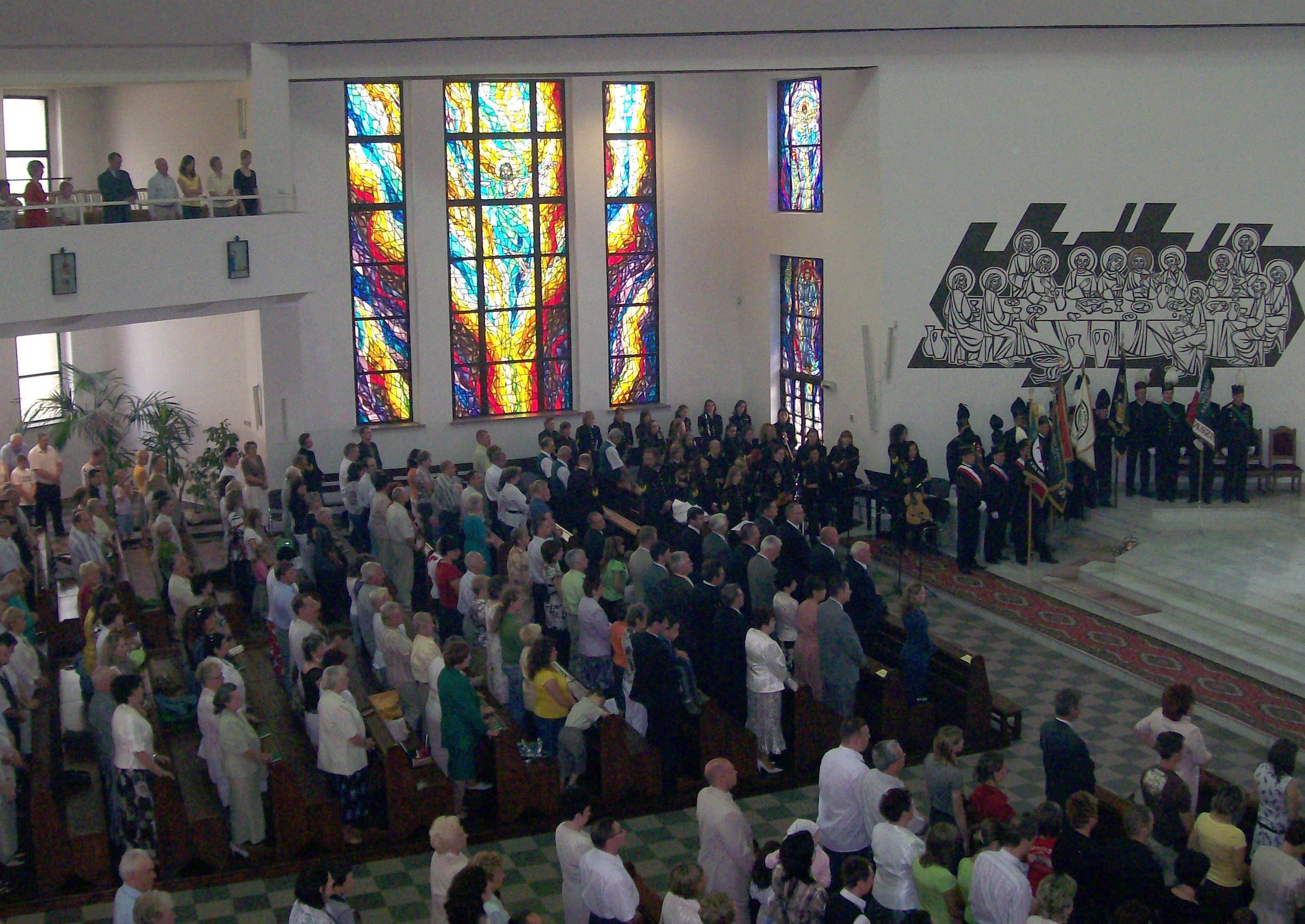 Uroczysta msza św. w dniu 29.06. 2008, w intencji pracowników Katowickiego Holdingu Węglowego - Katowice-Giszowiec, kościół pod wezwaniem św. Barbary z udziałem Żeńskiej Orkiestry Salonowej KHW S.A. KWK "Staszic"